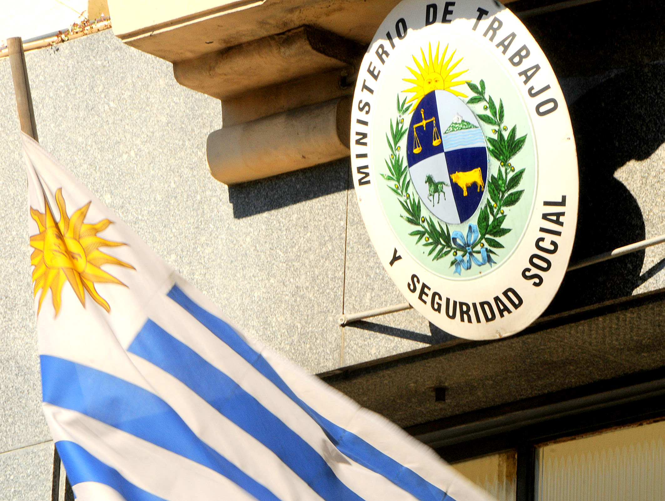 Ministerio de Trabajo Y Seguridad Social